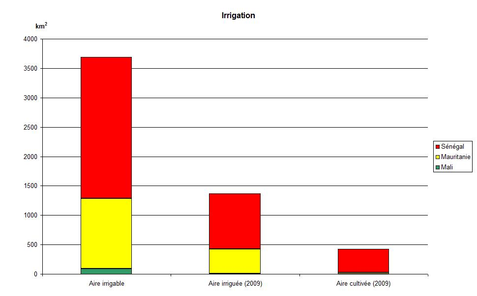 Surfaces irrigables, irriguées et cultivées dans la cadre de l'OMVS